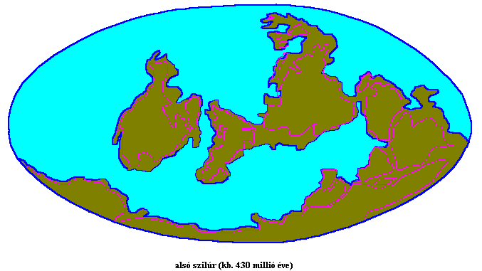 Alsó szilúr térképe